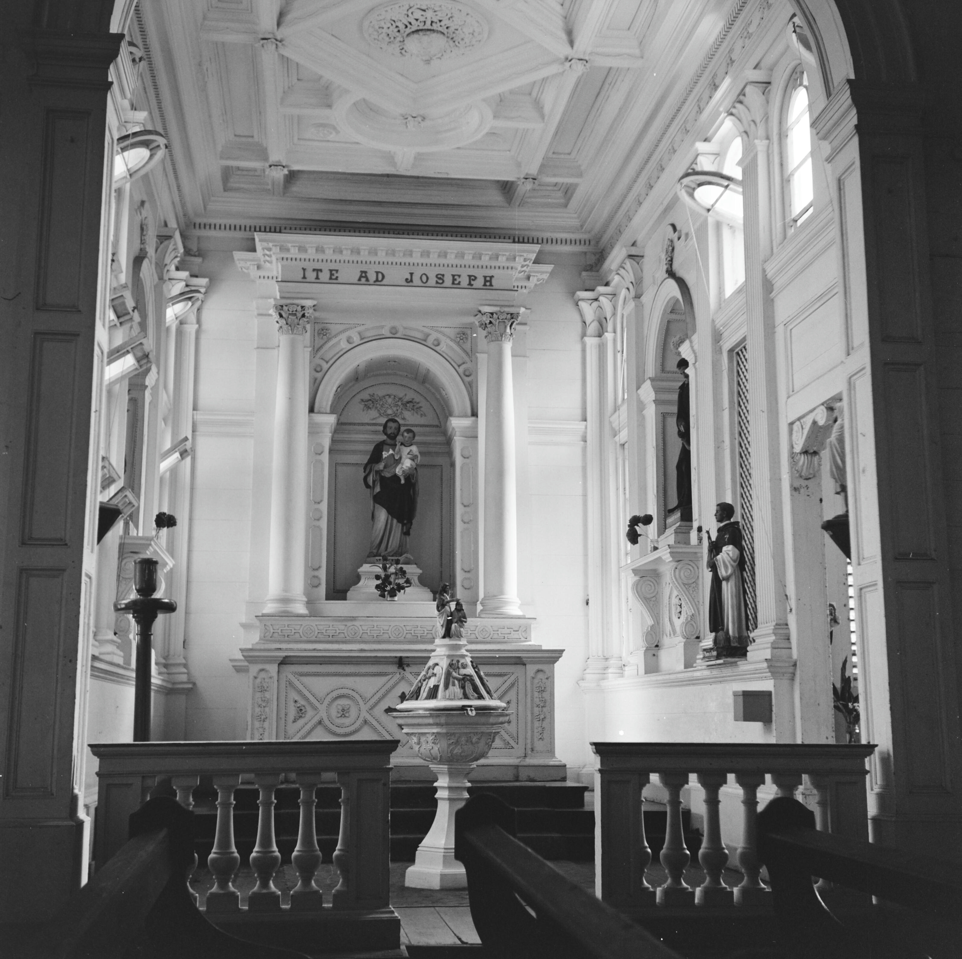 Rooms-Katholieke Kerk, interieurOnderwerp: kerken